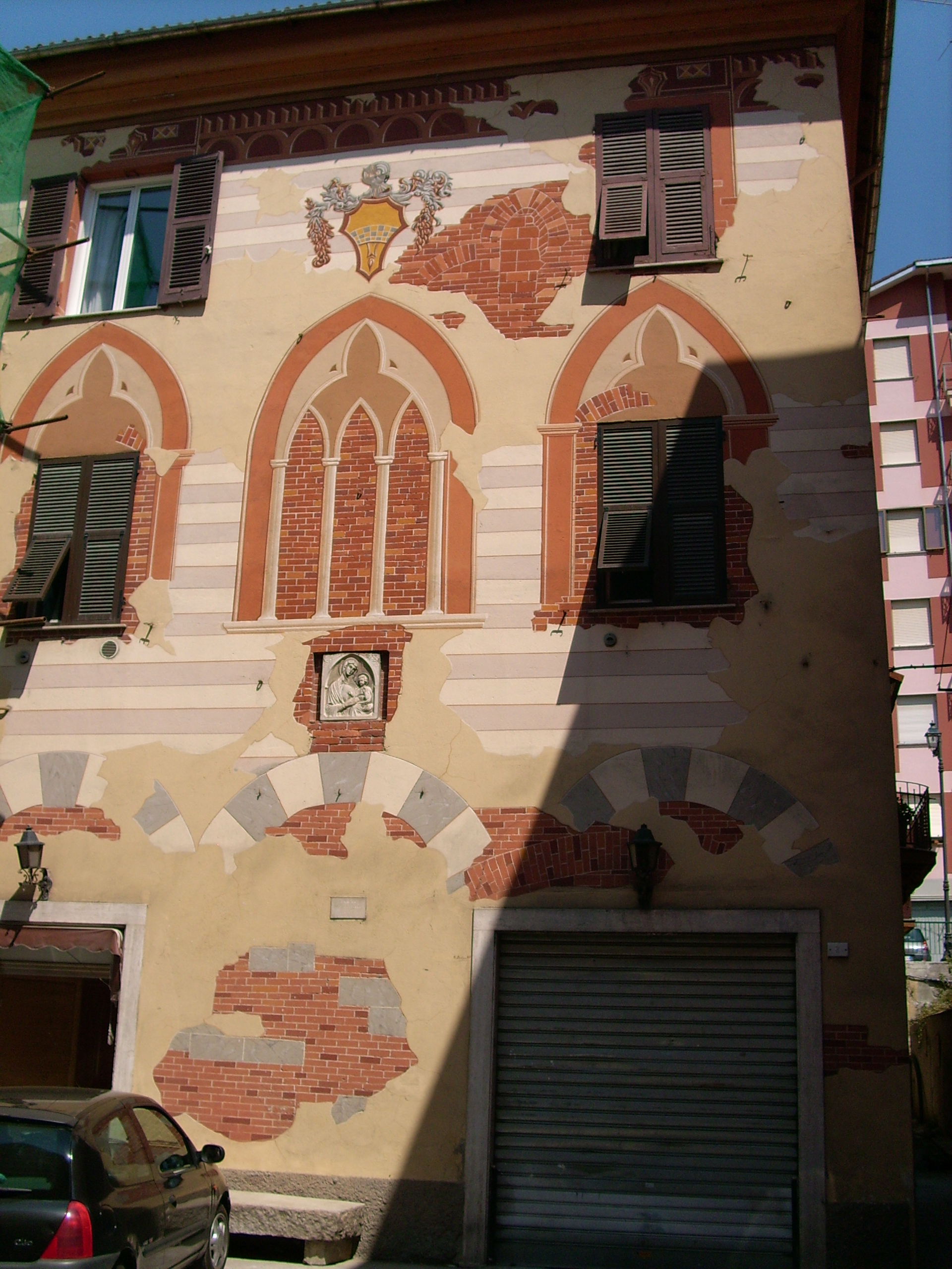 Tipico palazzo del centro storico presso Campo Ligure, Liguria, Italia